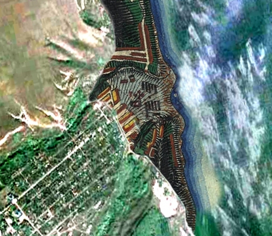 Зона затопления села Новодевичье при наполнении Куйбышевского водохранилища в 1955-1956 годах. В зоне затопления виден фрагмент старинной карты села. В створе ул Советской крестом в виде куполов обозначена церковь.Координаты места, где находился храм: 53° 36' 55" с. ш., 48° 51' 32" в. д.